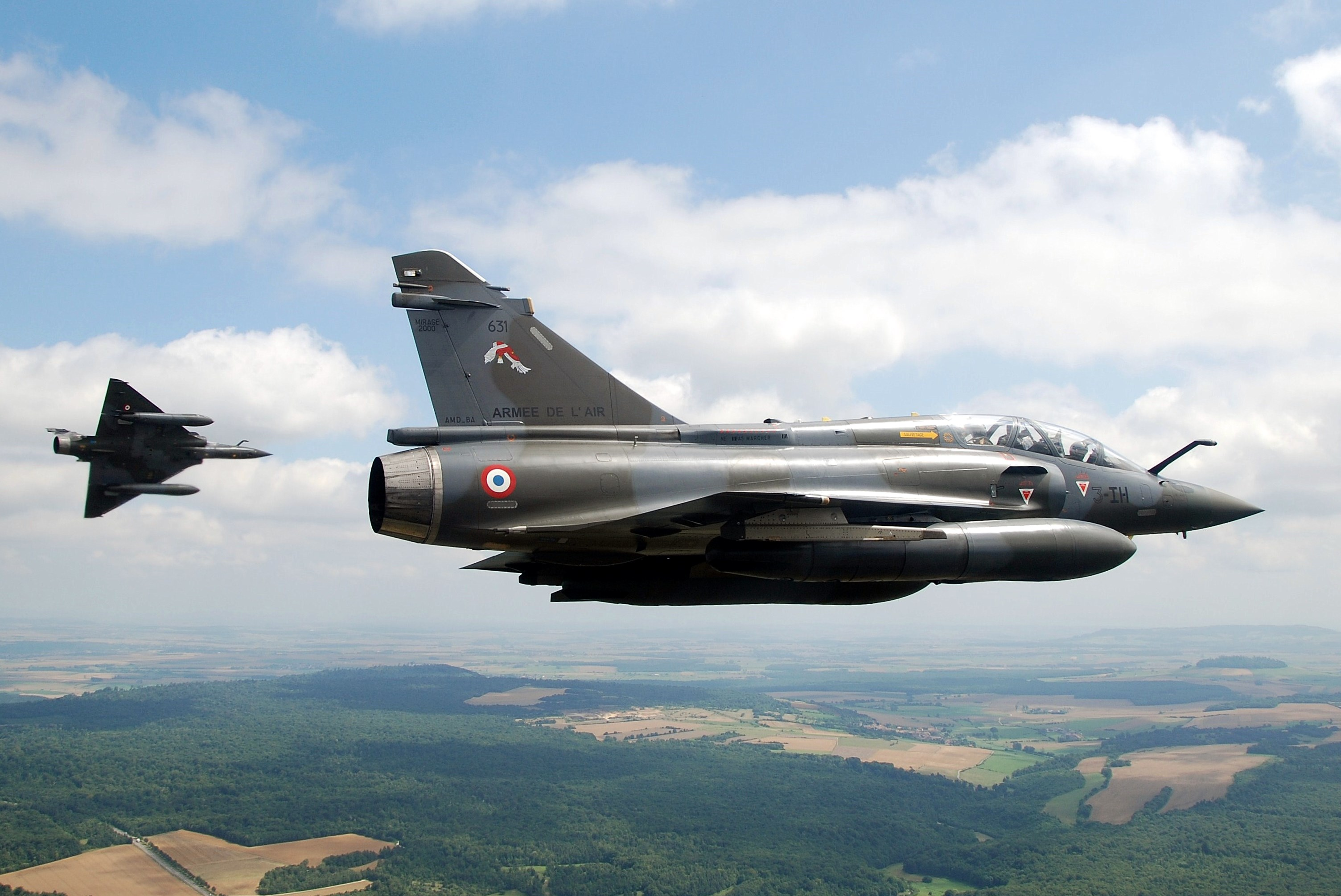 Départ au break pour une patrouille de M2000D de la SPA 153